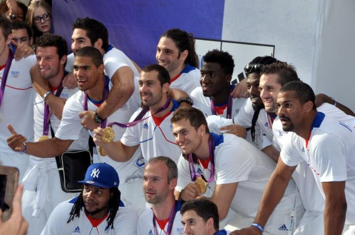 L'équipe masculine de handball au défilé des médaillés français des Jeux olympiques de 2012 : Guillaume Joli, Nikola Karabatic, Daniel Narcisse, Michaël Guigou, Bertrand Gille, Luc Abalo, Daouda Karaboué, Guillaume Gille, Didier Dinart, William Accambray, Cédric Sorhaindo, Thierry Omeyer, et Samuel Honrubia.